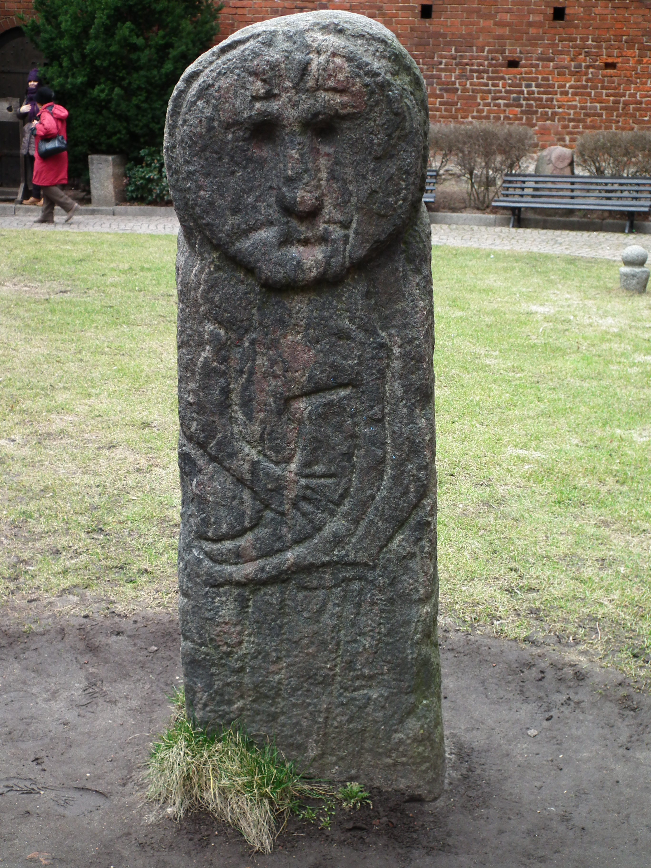 Zamek w Olsztynie.